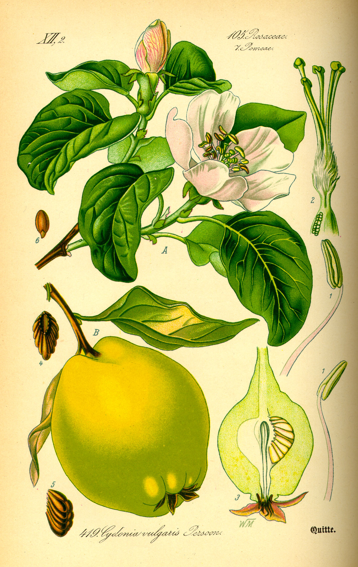 Cydonia oblonga in Flora von Deutschland, Österreich und der Schweiz